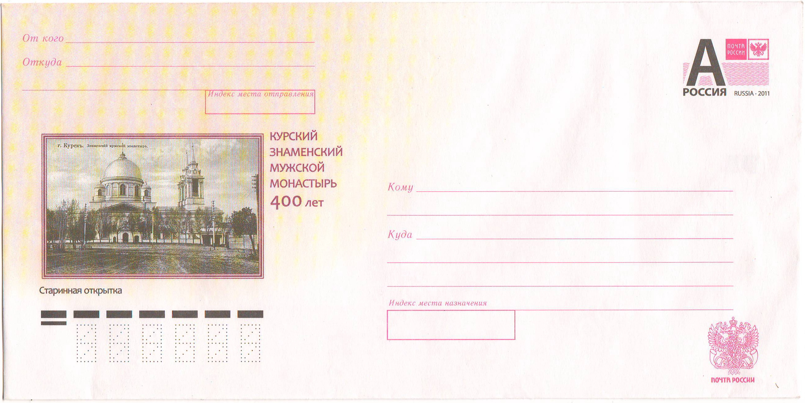 Почтовый конверт России — Курский Знаменский мужской монастырь. 400 лет